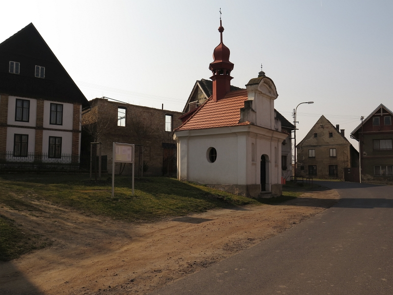 Kaple, Mastířovice.